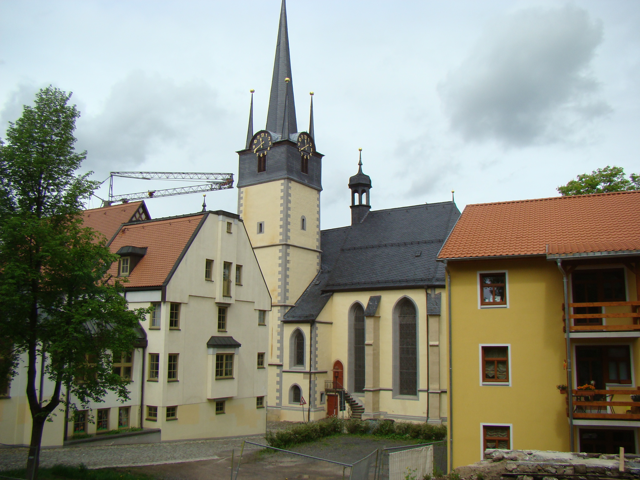 Pößneck